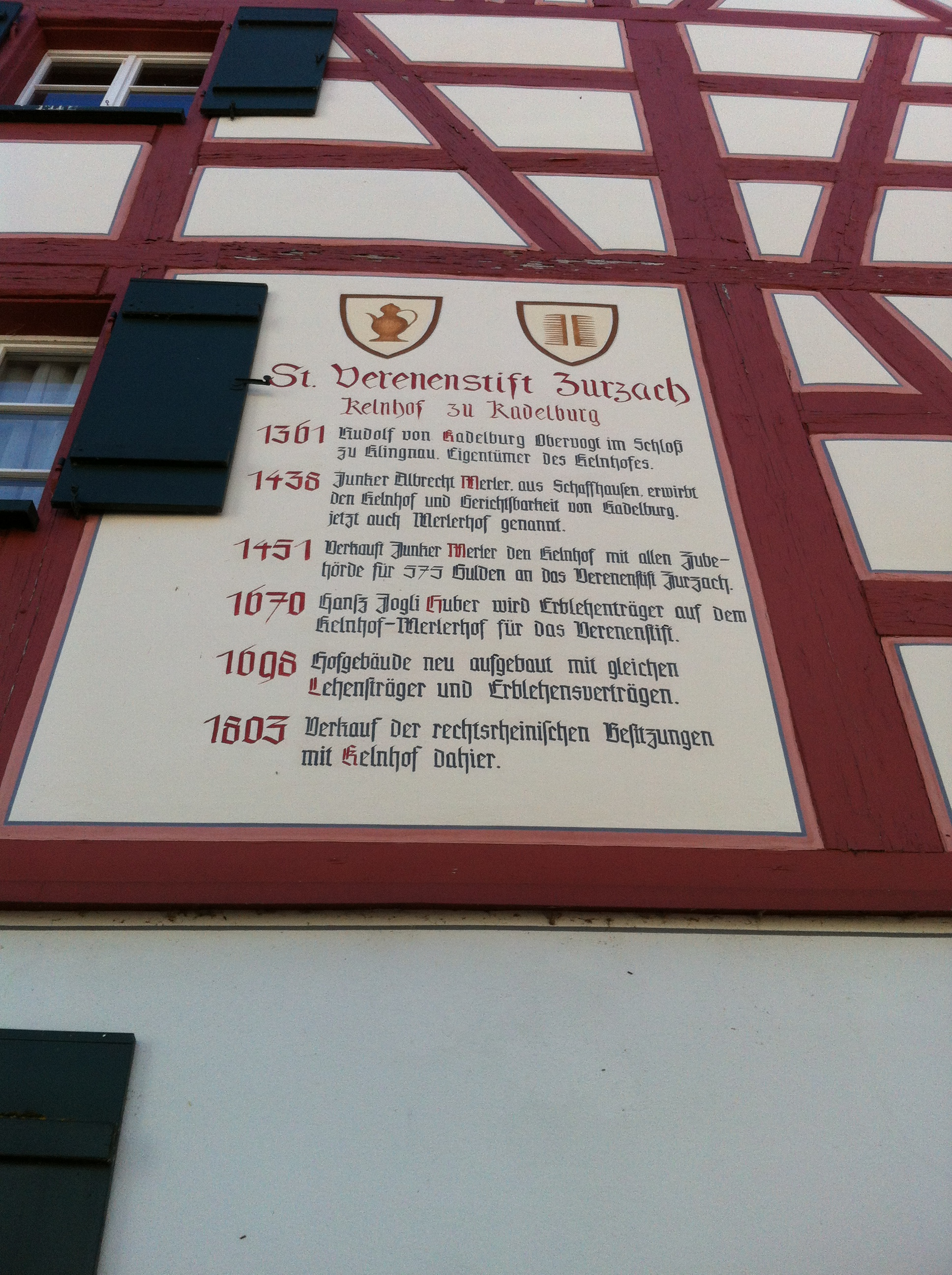 KB Küssaberg, Gemeinde im Landkreis Waldshut in Baden-Württemberg. Ortschaft Kadelburg, Kelnhof — Inschrift mit historischen Daten.